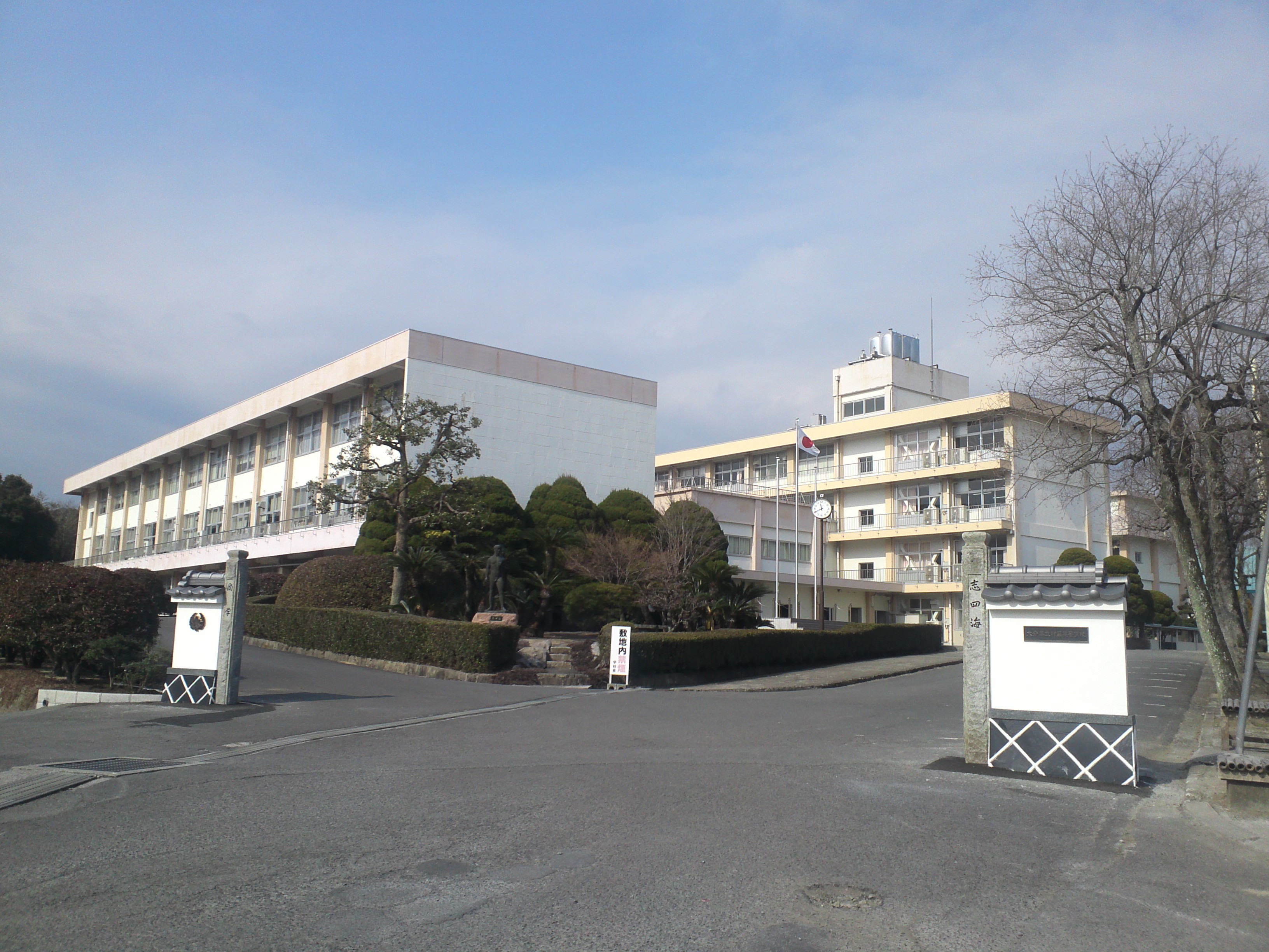 大分県立杵築高等学校外観